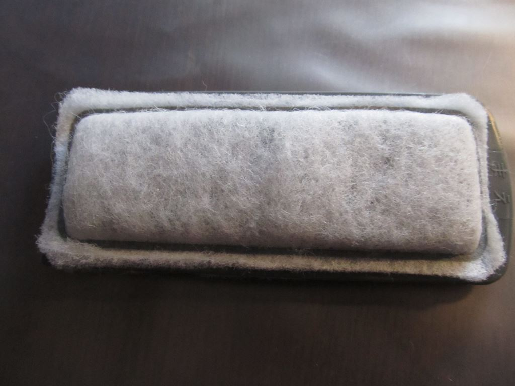 ジェックス・外掛け式スリムフィルター「スリムフィルターＳＳ」ろ材カセット